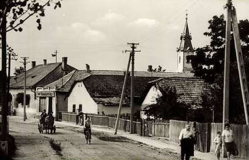 Cigánd Fő utcája az 1960-as években